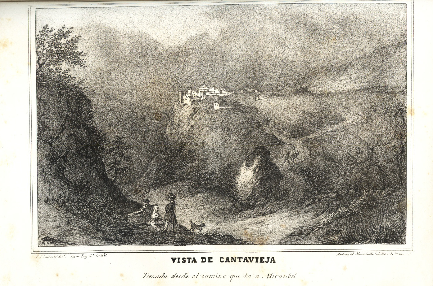 Cantavieja. Dámaso Calbo y Rochina de Castro. "Historia de Cabrera". Madrid 1845